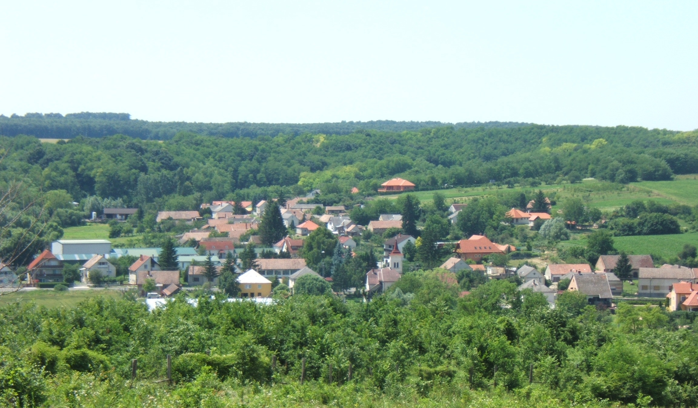 Sántos látképe